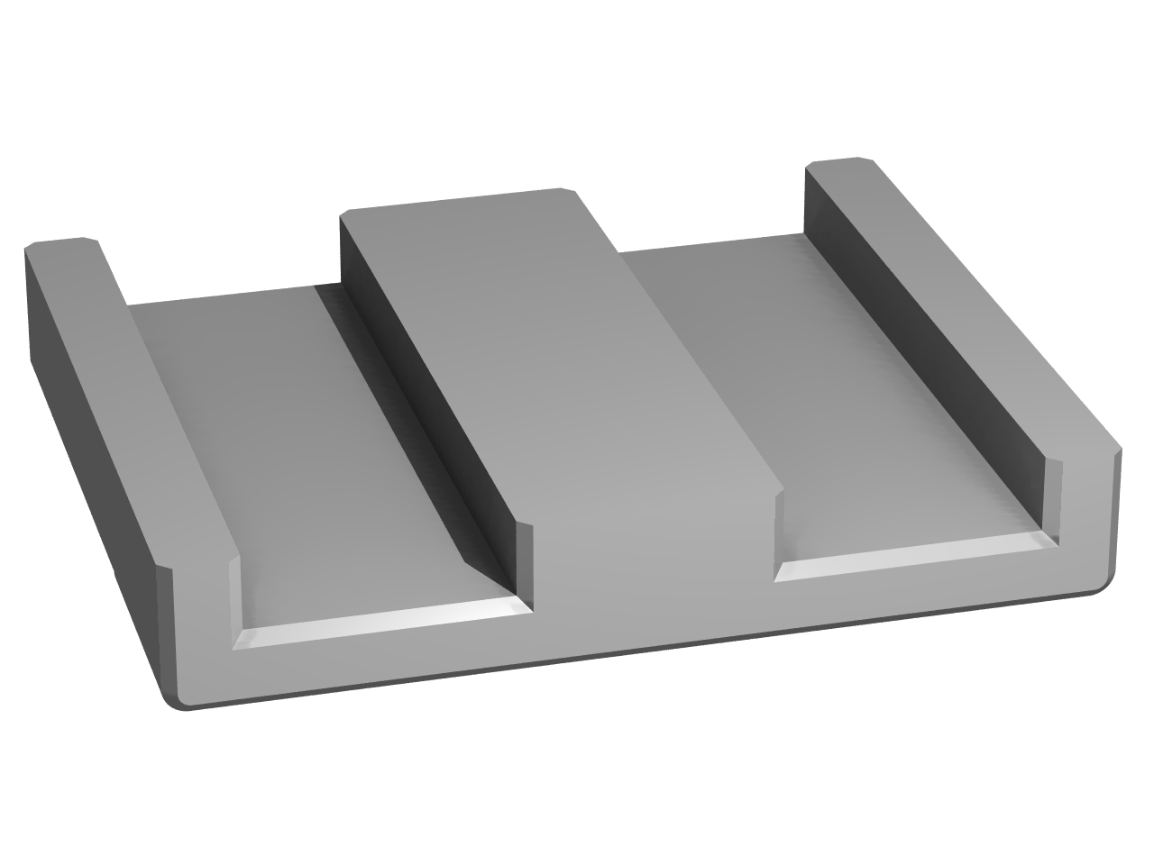 Planar magnetic core